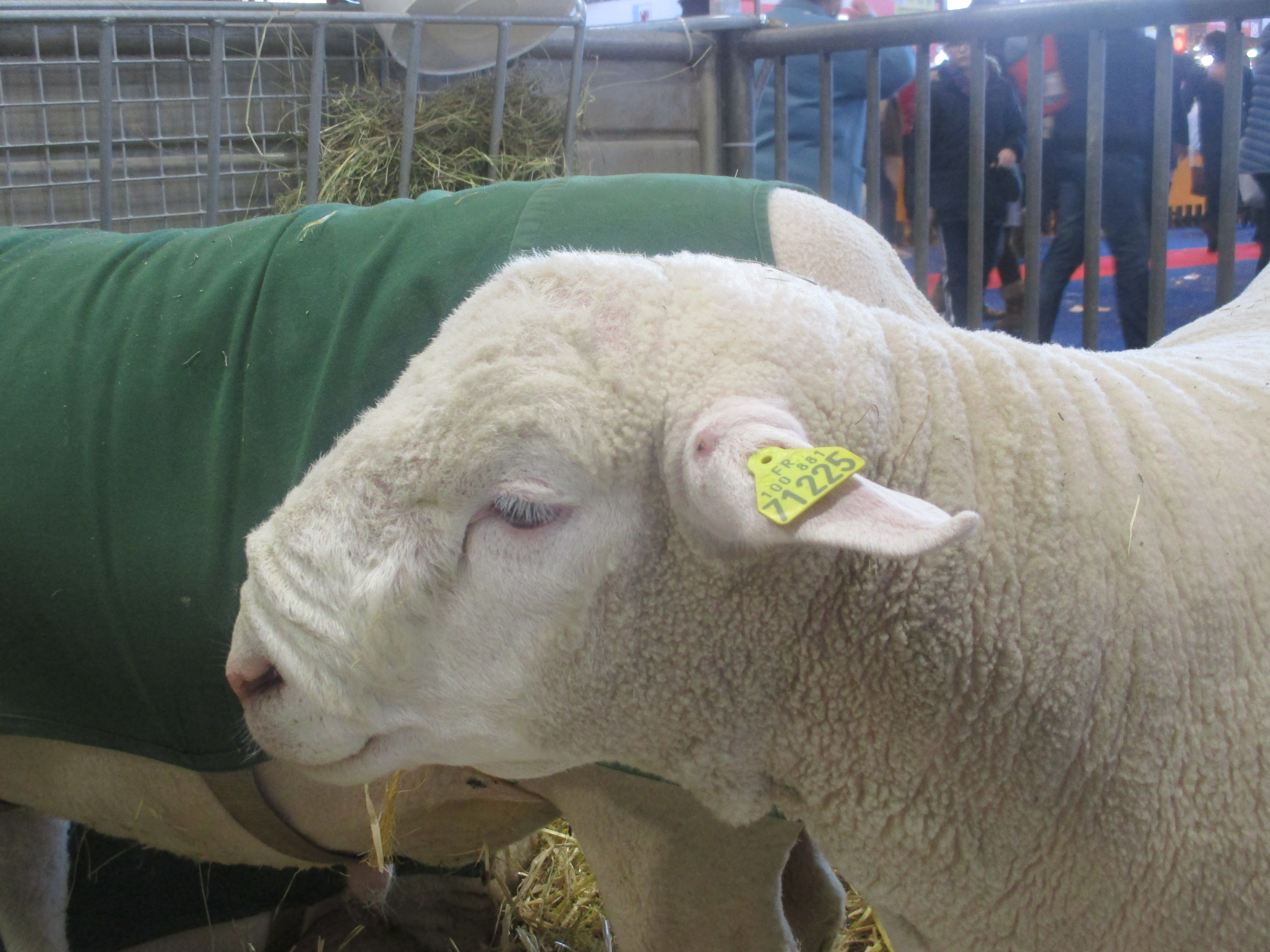 Mouton Île-de-France. SDA 2018.